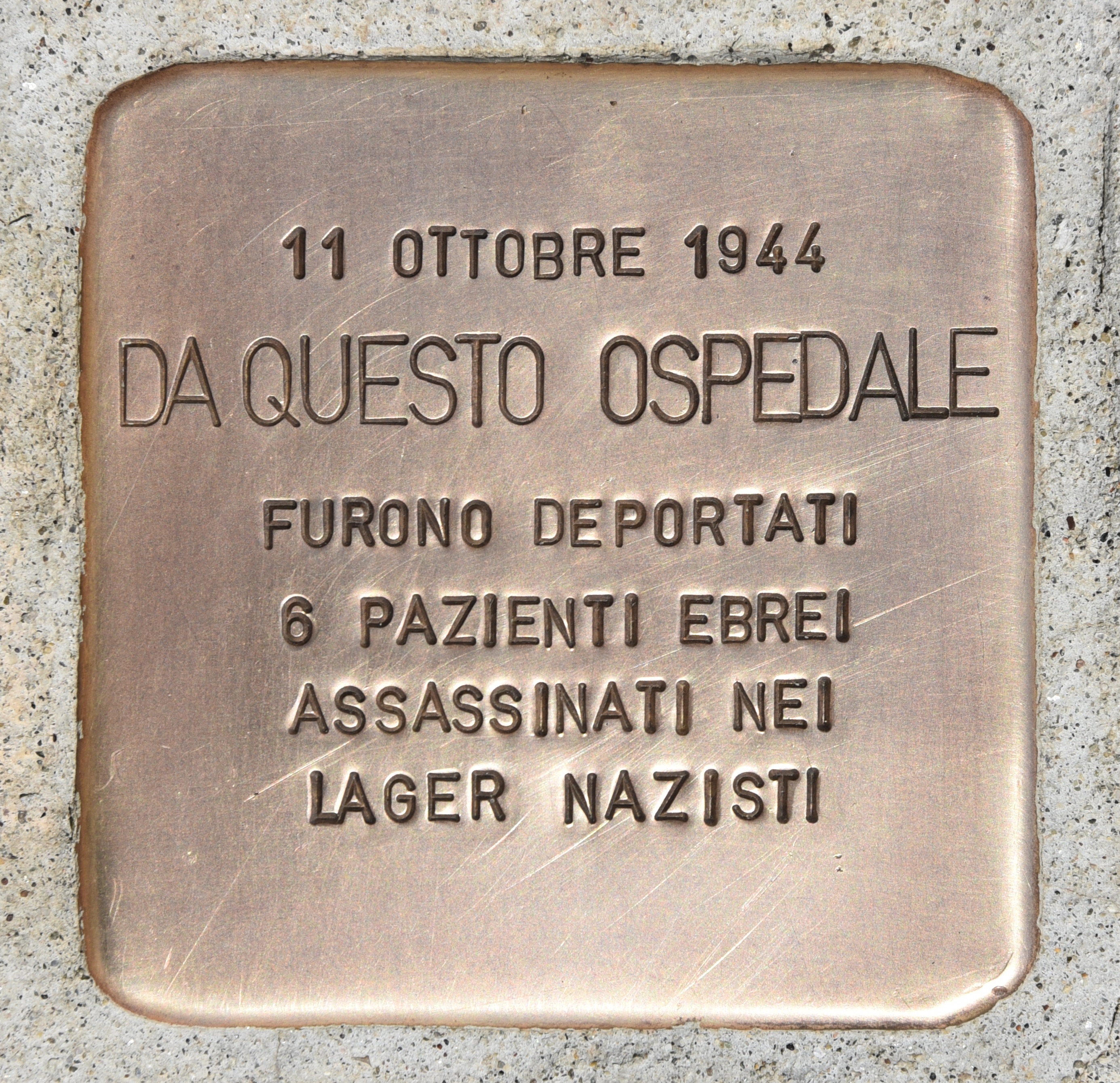 Stolperstein für 6 deportierte Patienten, Isola di San Servolo